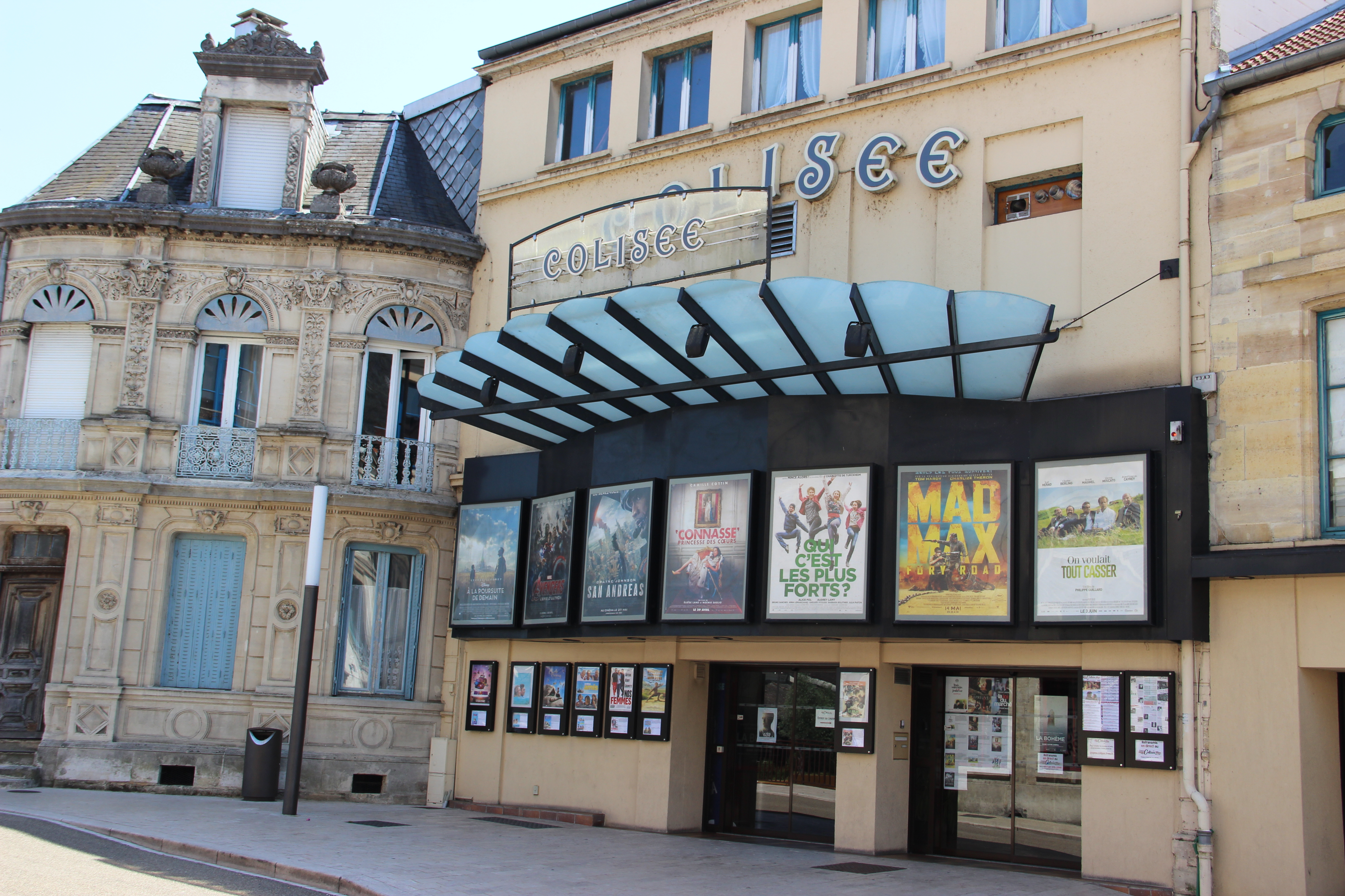 Cinéma le Colisée